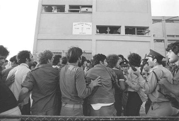 אסון מעלות. פיגוע בבית ספר במעלות.